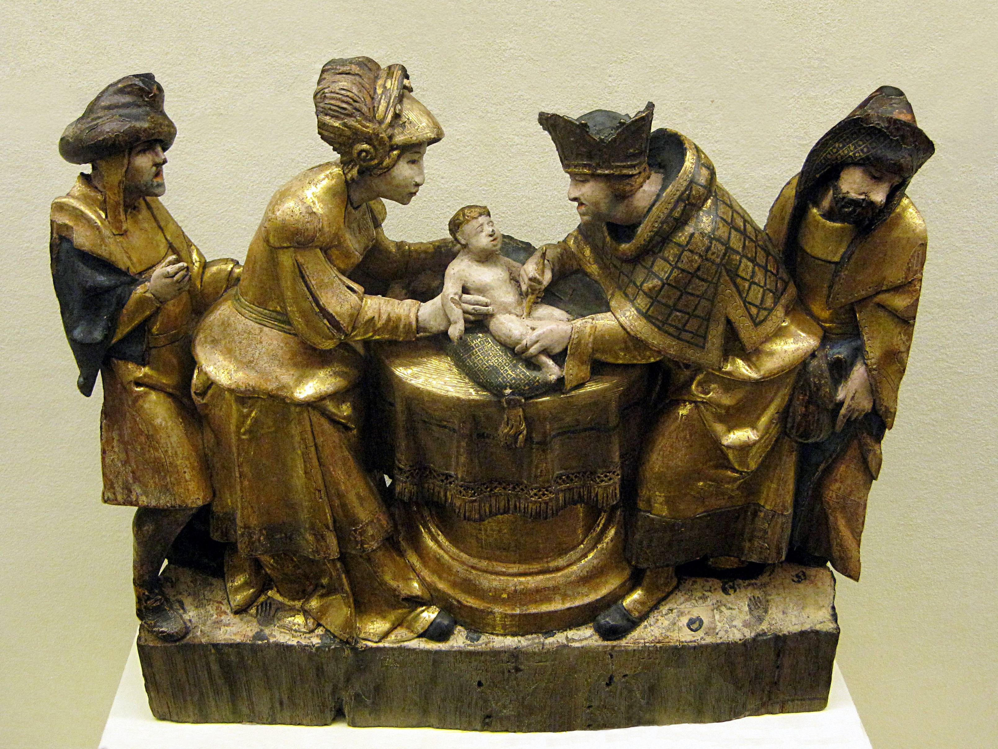 La circoncision du Christ (H. 35 cm ; L. 39 cm), fragment de retable en bois polychrome doré, réalisé durant le premier quart du XVIe siècle à Anvers, exposé dans la section du musée national du Moyen Âge du musée de Cluny à Paris (Réf. C.I. 268), et y photographié le 09 décembre 2011 lors de la visite organisée à l’occasion de la cérémonie de remise des prix de Wikilove France 2011.